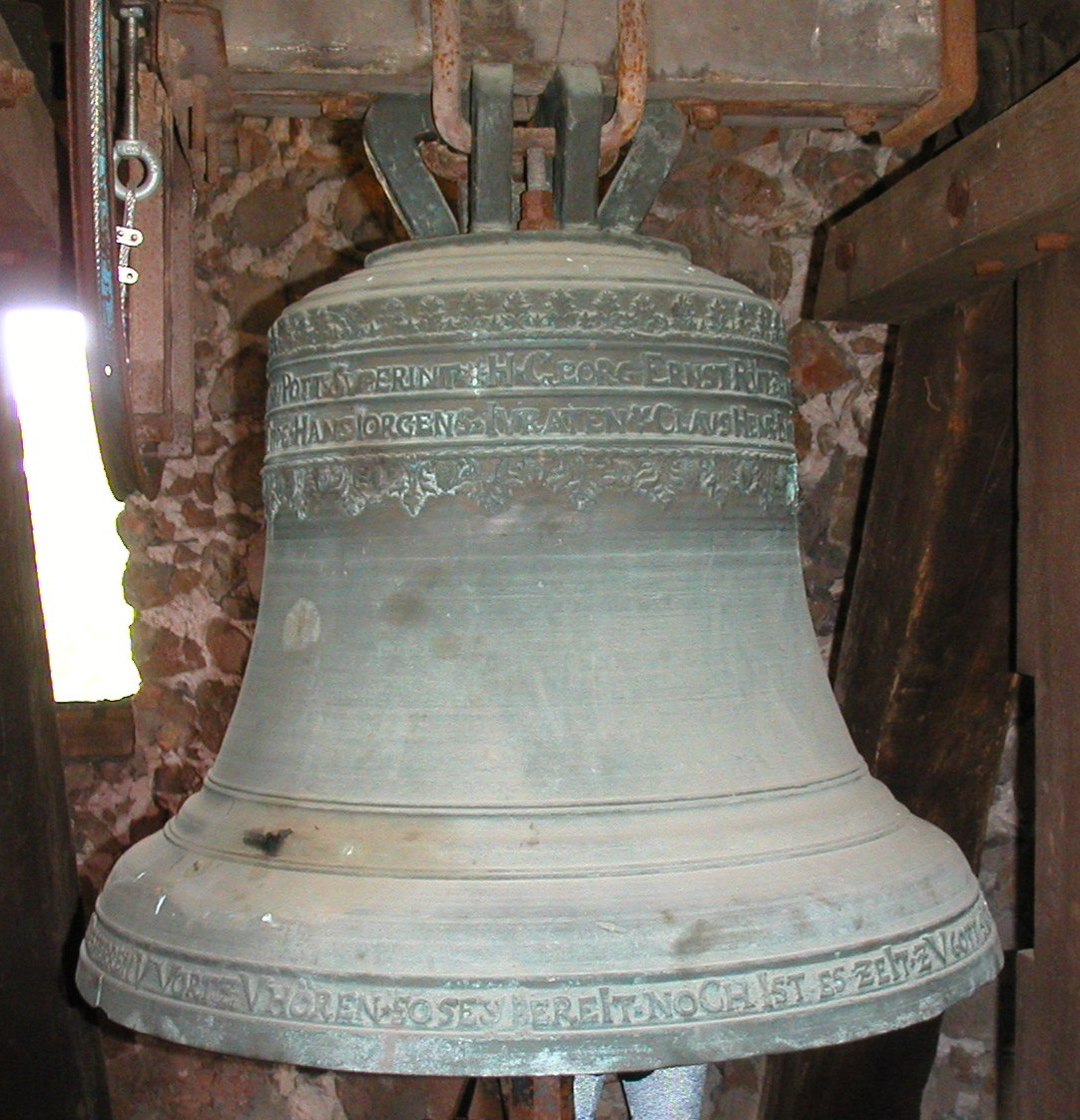 Glocke der St.-Vitus-Kirche in Barskamp